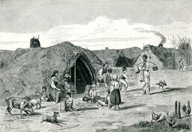 Romanian gypsies